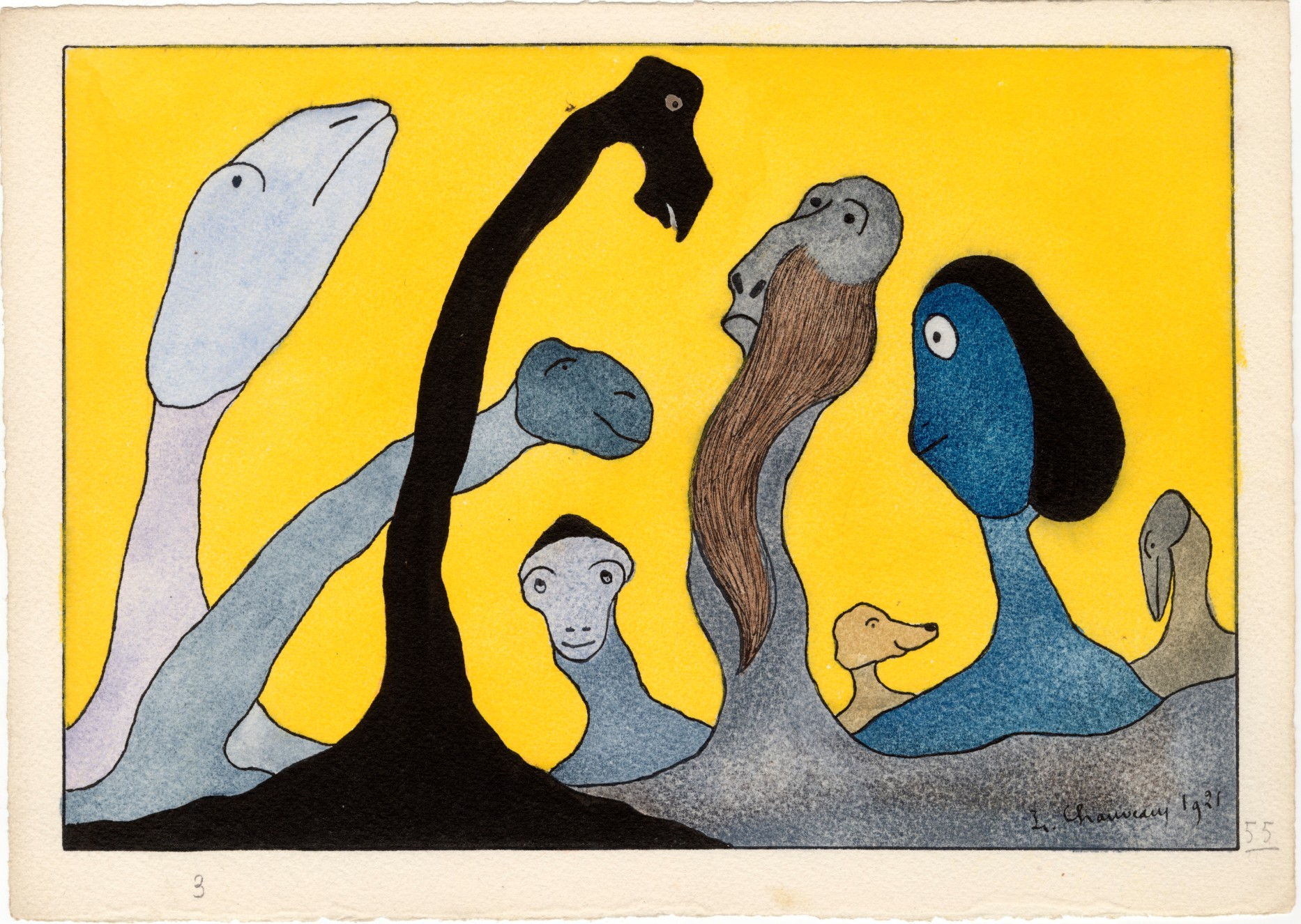 Léopold Chauveau (1870-1940) Paysage monstrueux, n°55, 1921 Encre noire et aquarelle - 18,7 x 26,5 cm Paris, Musée d’Orsay Photo : Musée d’Orsay-RMN-GP/Patrice Schmidt